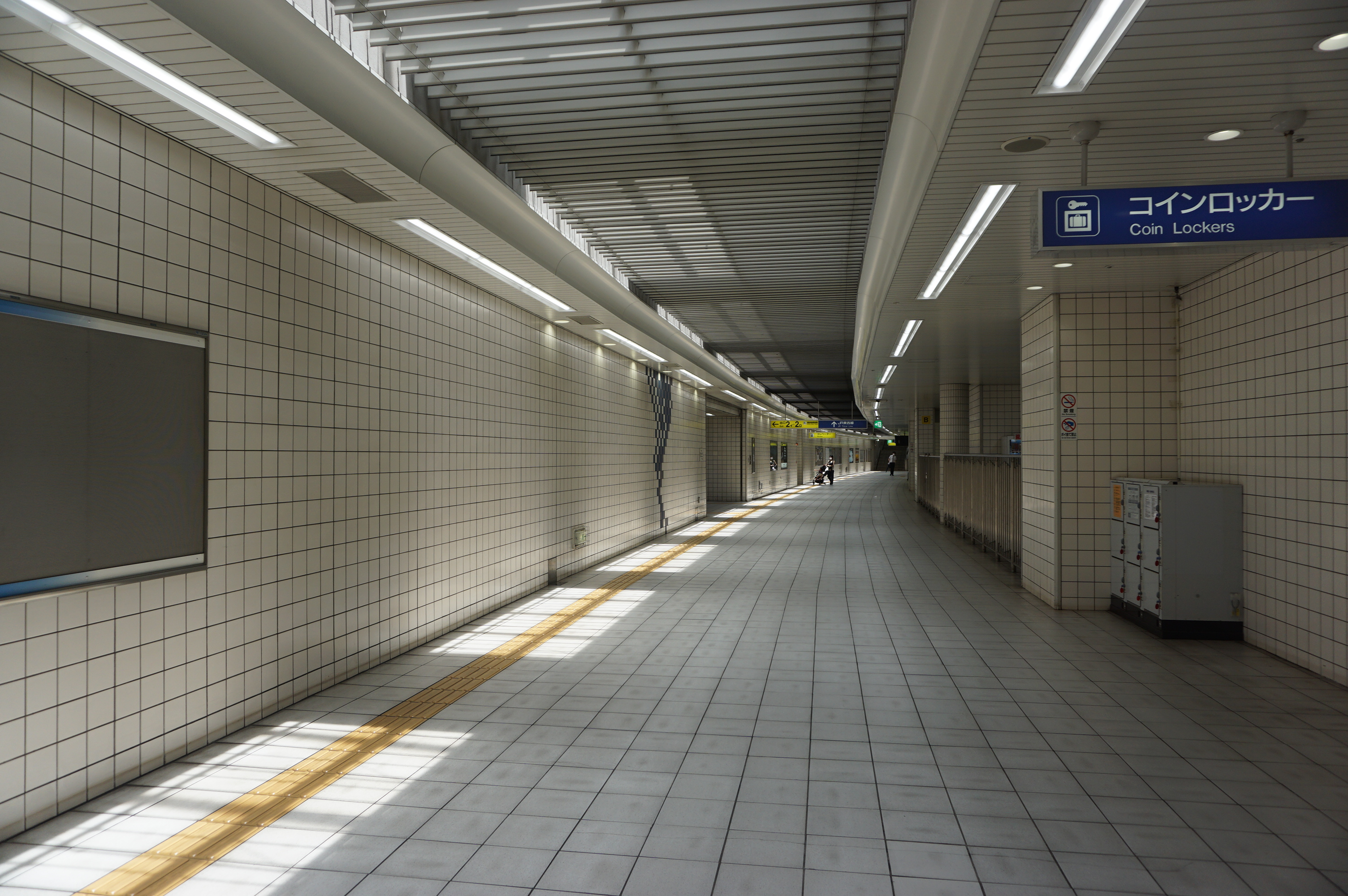 加島駅の改札外コンコース。天窓で明かりを取り入れている。2020年7月撮影。 Sony ILCE-6000